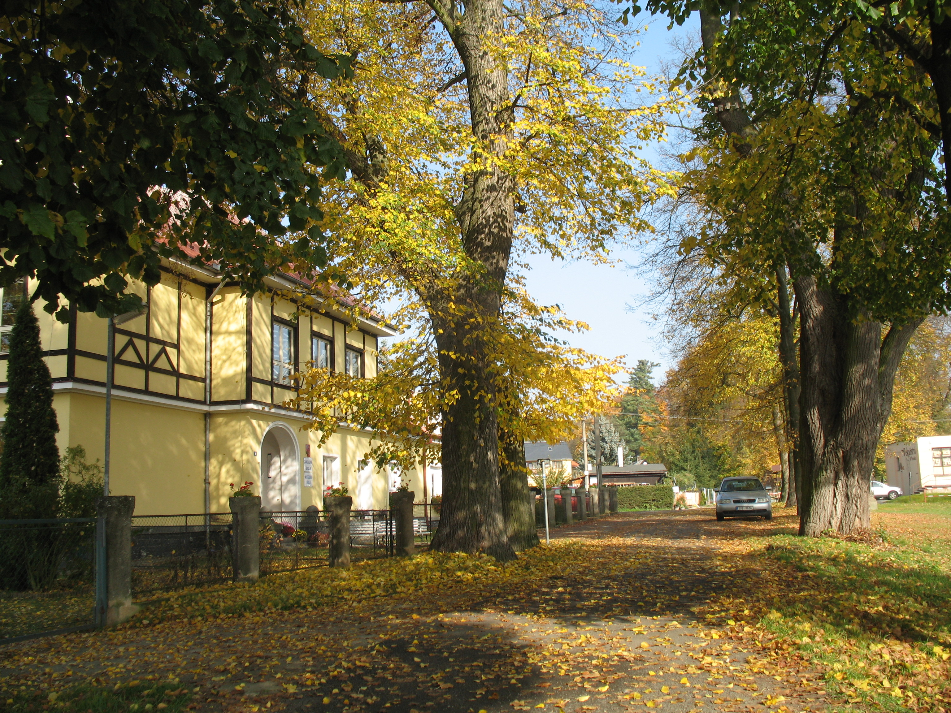 Valdštejnská alej (součást přírodní památky Zahrádky u České Lípy) lemuje cestu ze Zahrádek k zámečku Vřísek (Vítkovec) na Žižkově vrchu. Vlevo místní základní škola v Zahrádkách